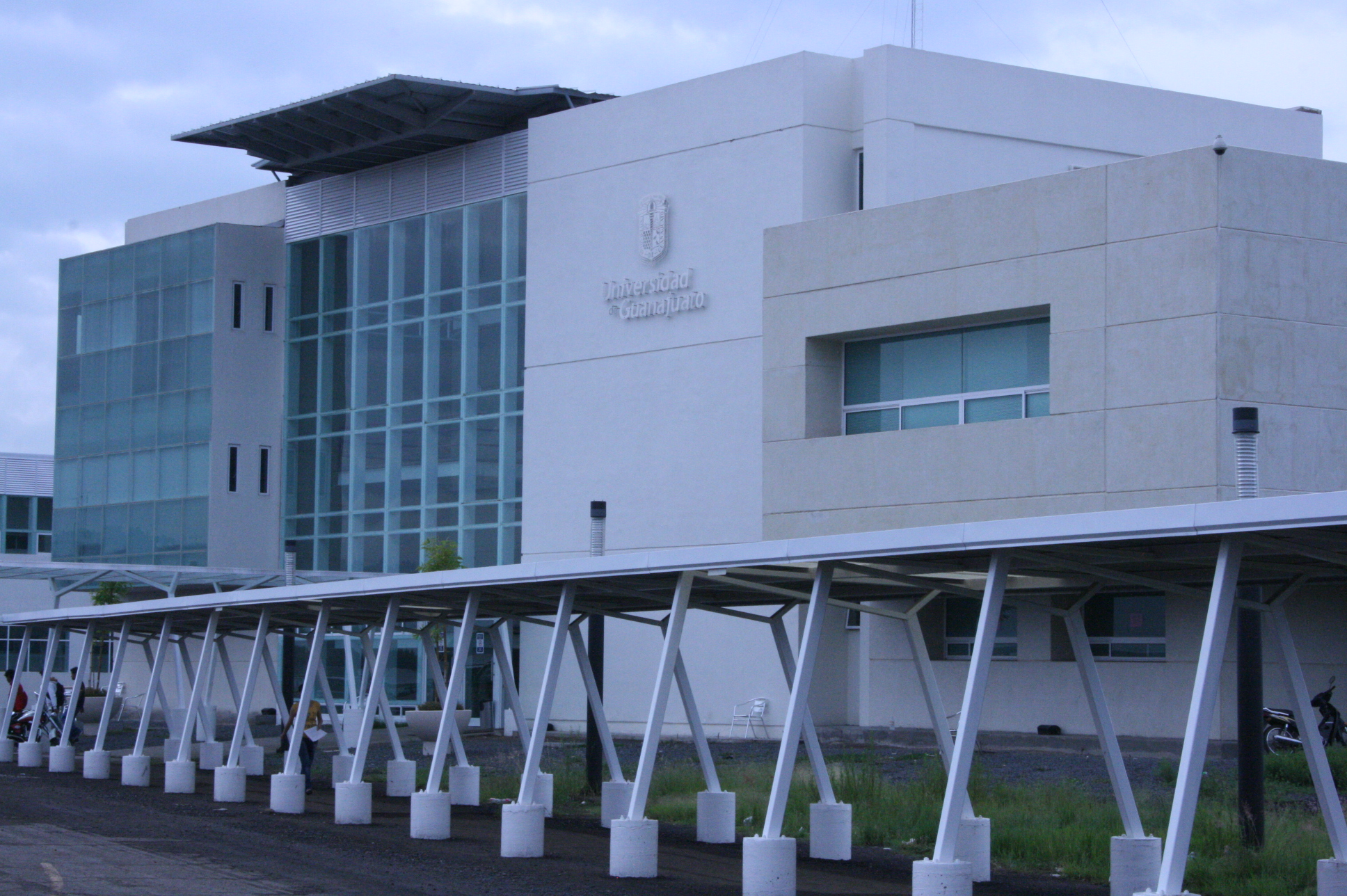 Campus León